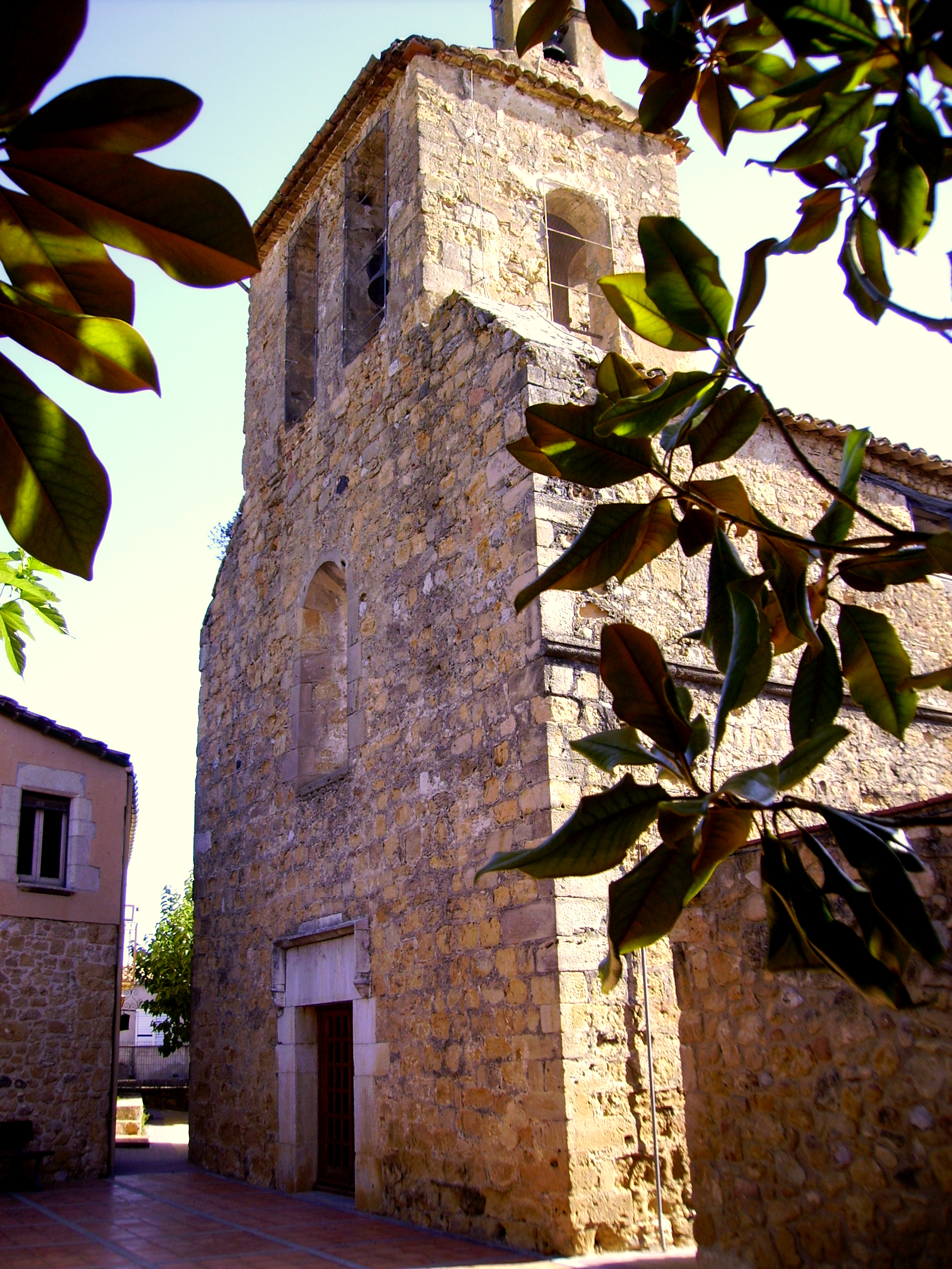 Església parroquial de Sant Joan Baptista (Vilademuls)